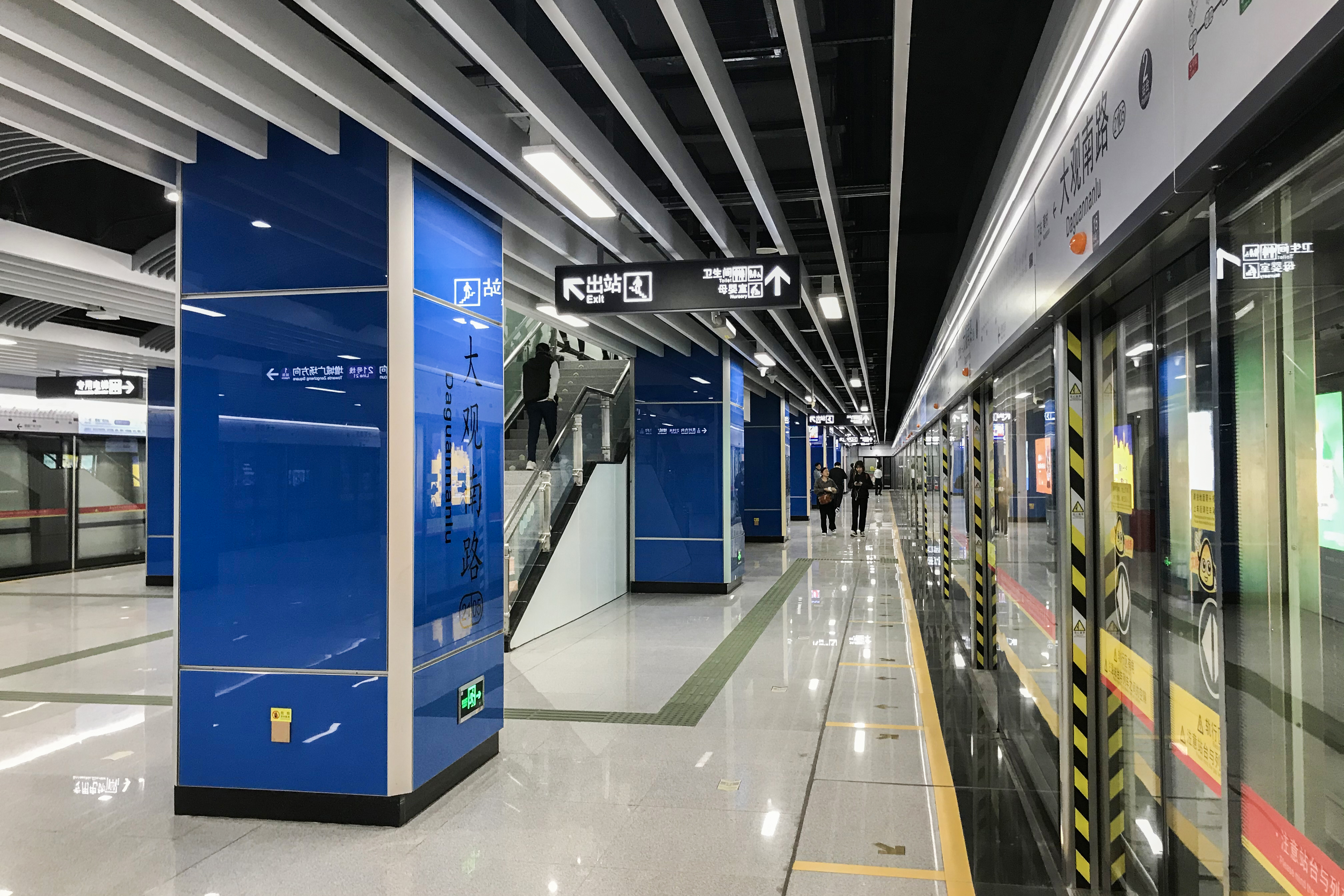 广州地铁大观南路站